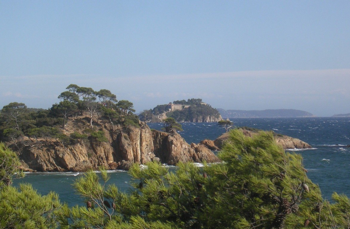 Le fort de Brégançon (Var) France